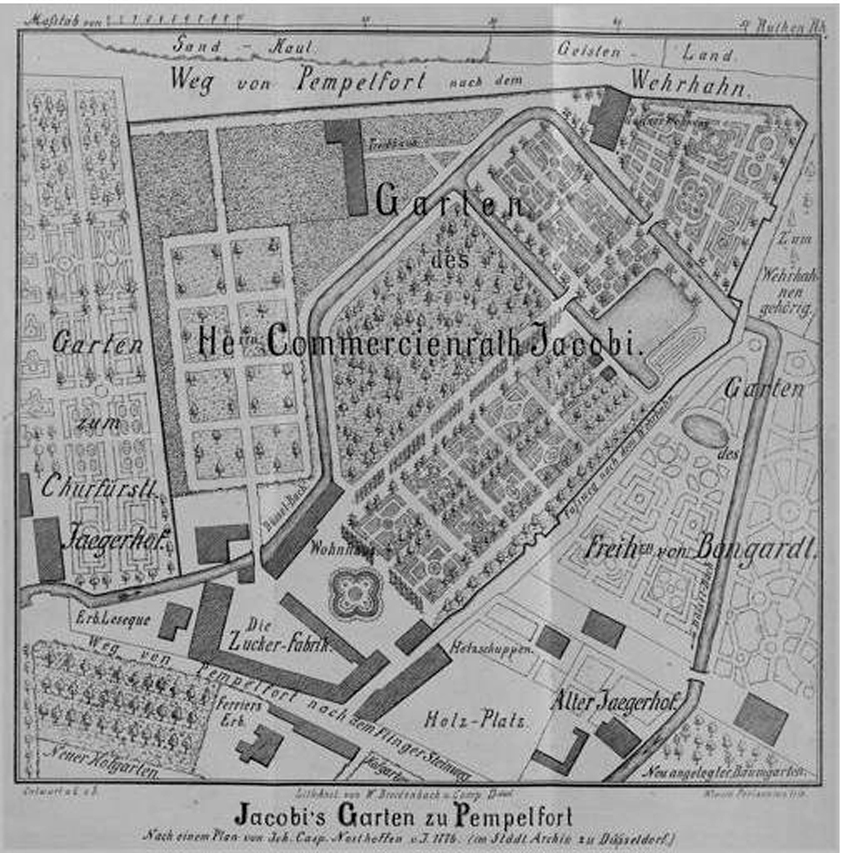 Jacobi's Garten zu Pempelfort, Plan von Joh. Casp. Nosthoffen, 1776: Kommerzienrat und Kaufmann Johann Konrad Jacobi (1715–1788) erwarb 1742 ein kleines Gut in Pempelfort und ließ dort einen Barockgarten mit Parterre und Allee anlegen.